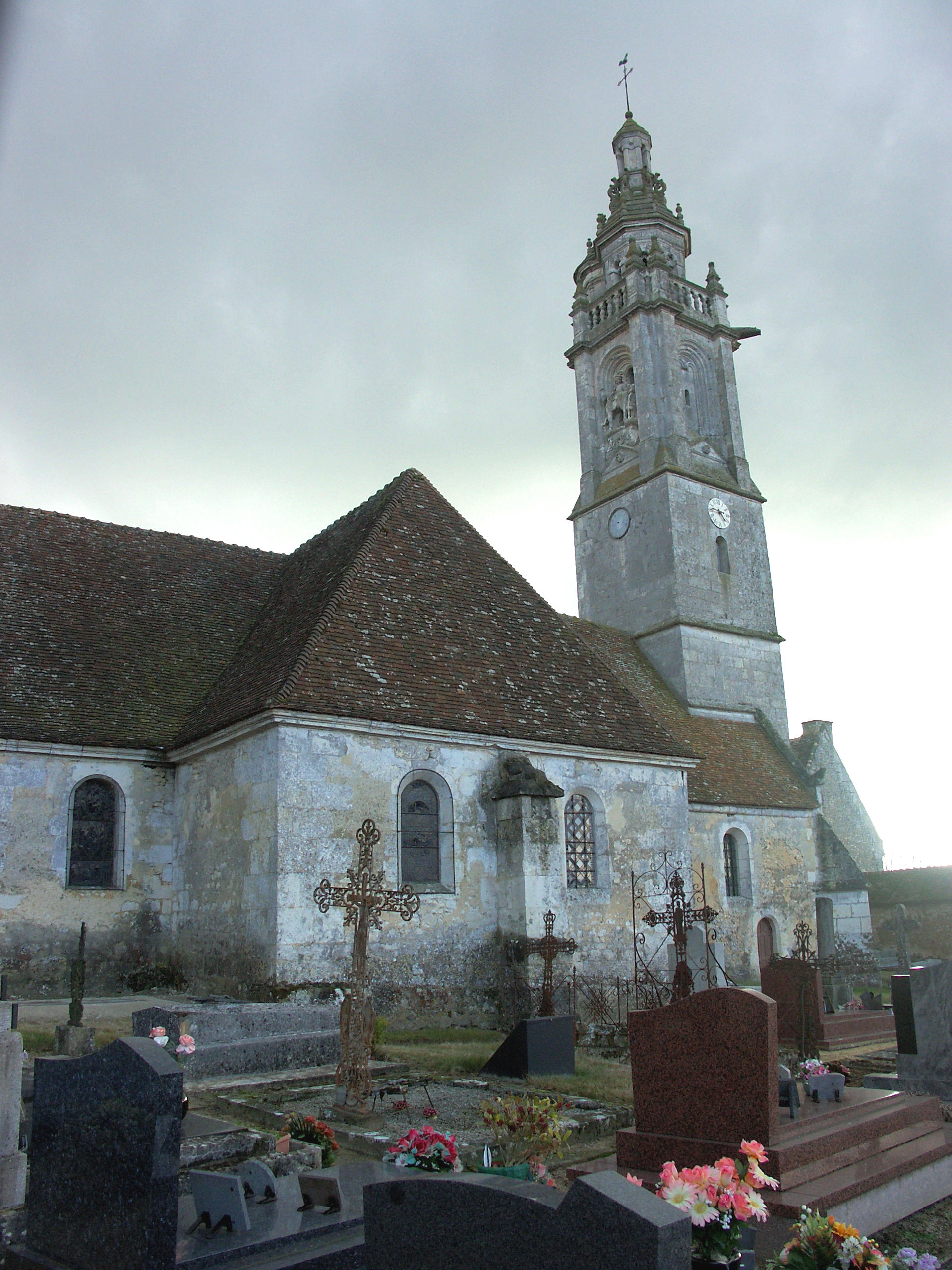 Dans la première moitié du 17e s une tour-clocher (CMH 1905) et deux chapelles latérales embellissent l’église à l’origine romane. Vue du nord. .